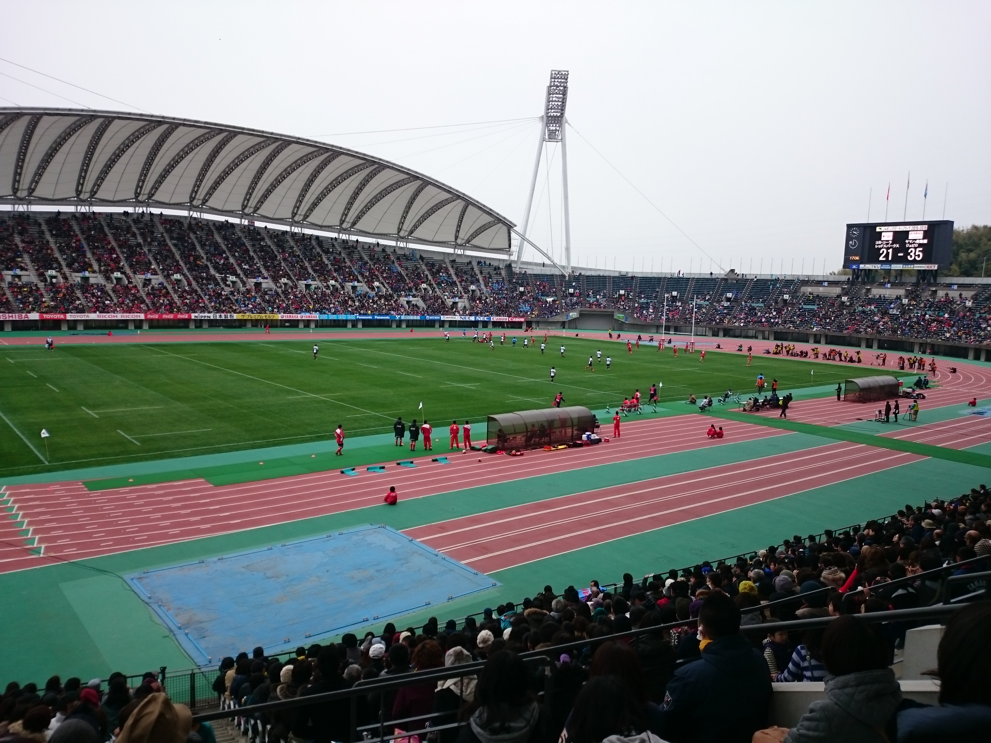 県民運動公園の画像